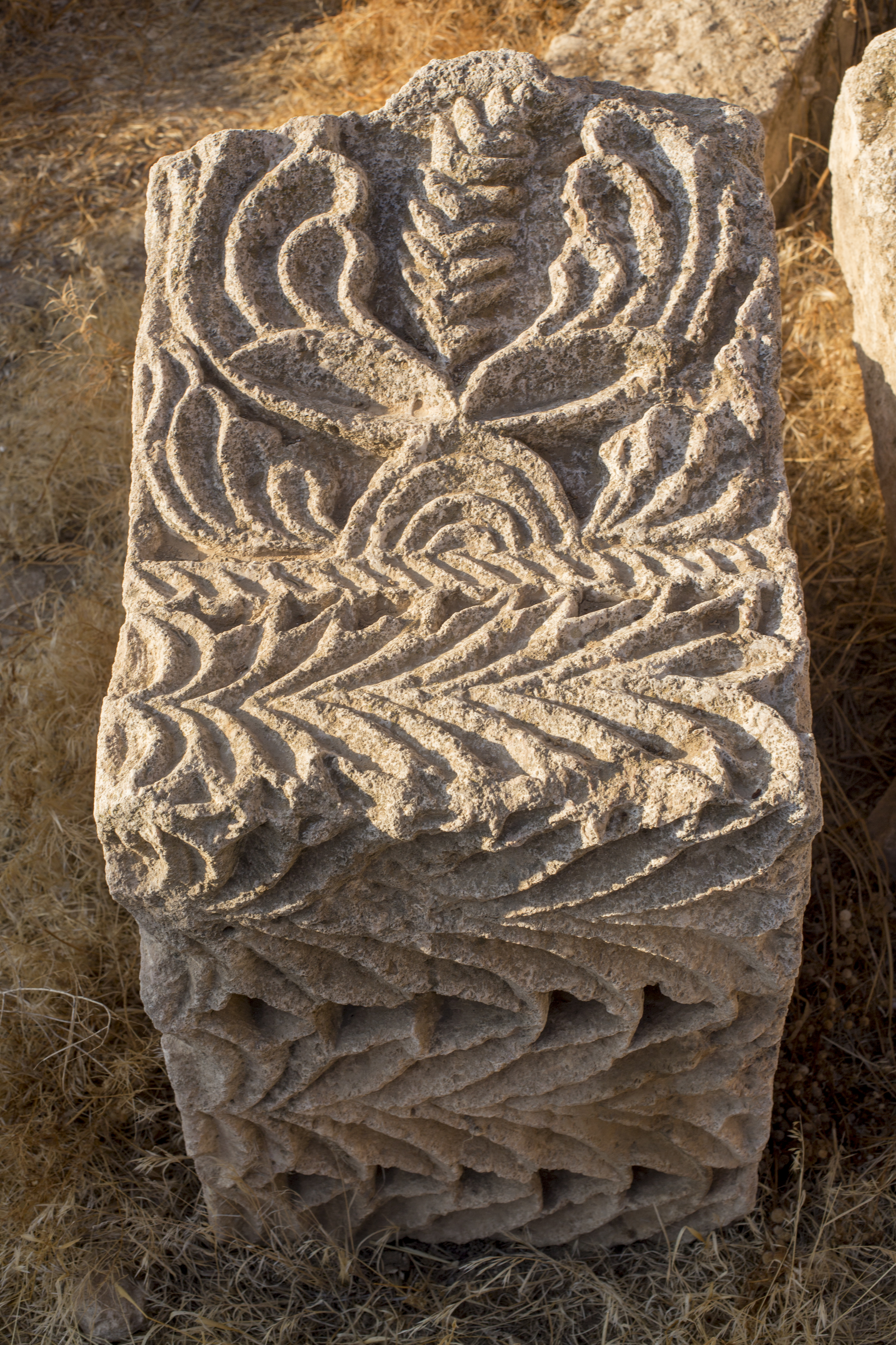 Architekturdetail aus Qasr Al-Qastal Mosque of Al-Qastal